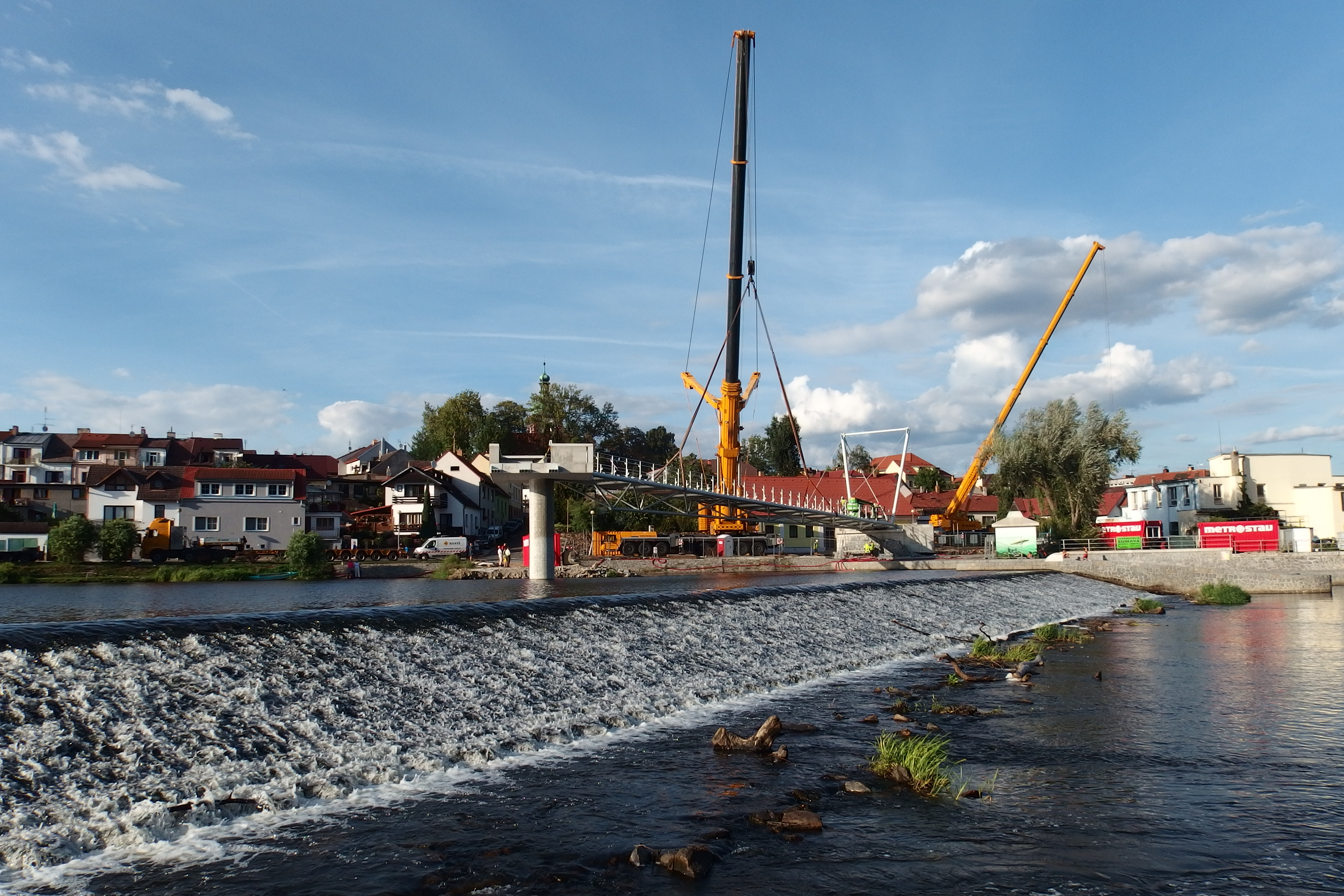 Stavba Pleskotovy lávky v Písku. Velký jeřáb nosnost 500t, malý 100 t. Pokládka kovové mostovky.